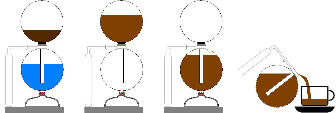 Siphonofir.JPG